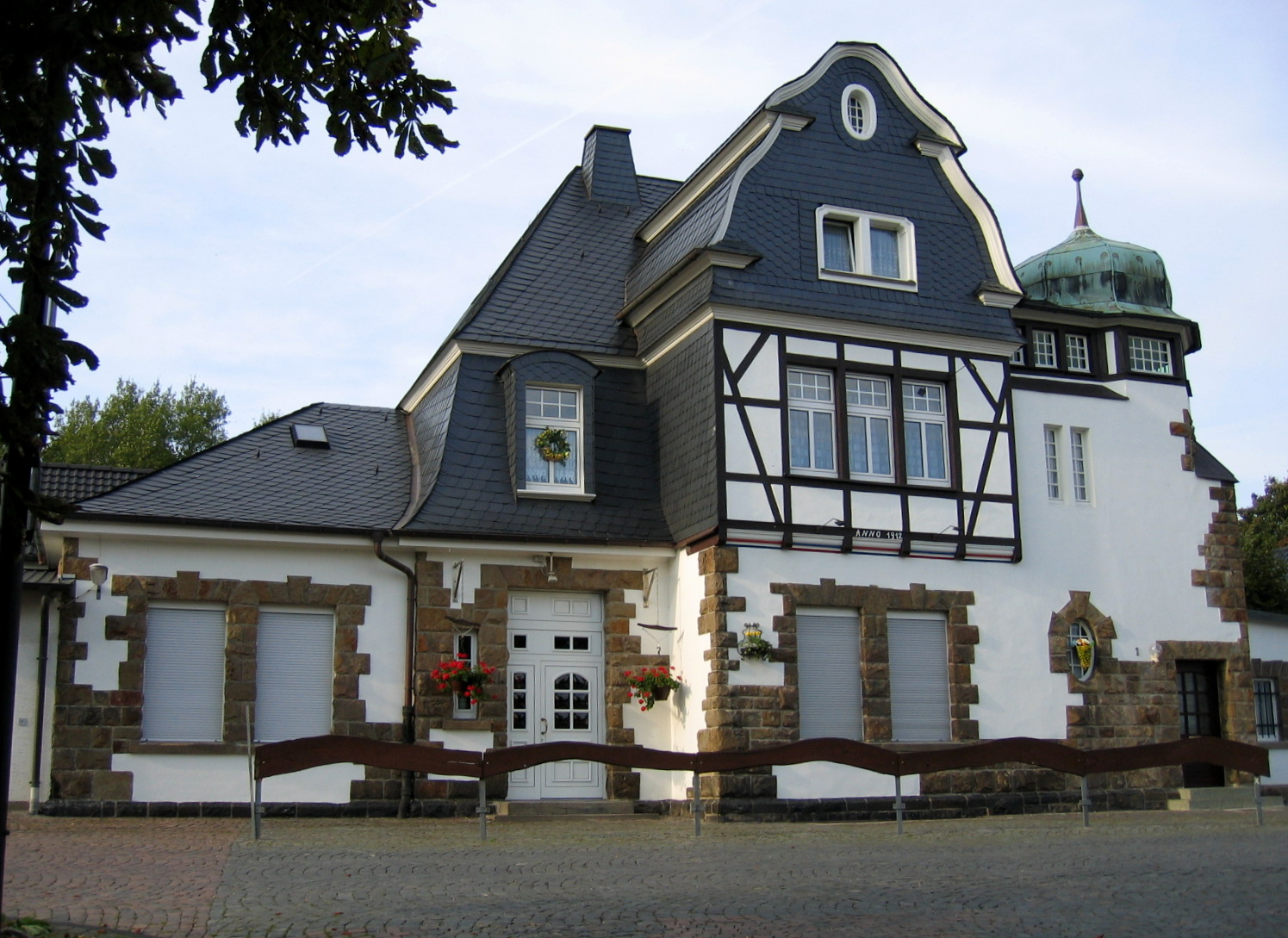 Description: Ehemaliges Bahnhofsgebäude (heute Wohnhaus) in Balve. Erbaut 1912. Source: selbst fotografiert Date: 9. Okt. 2005 Author: Bubo